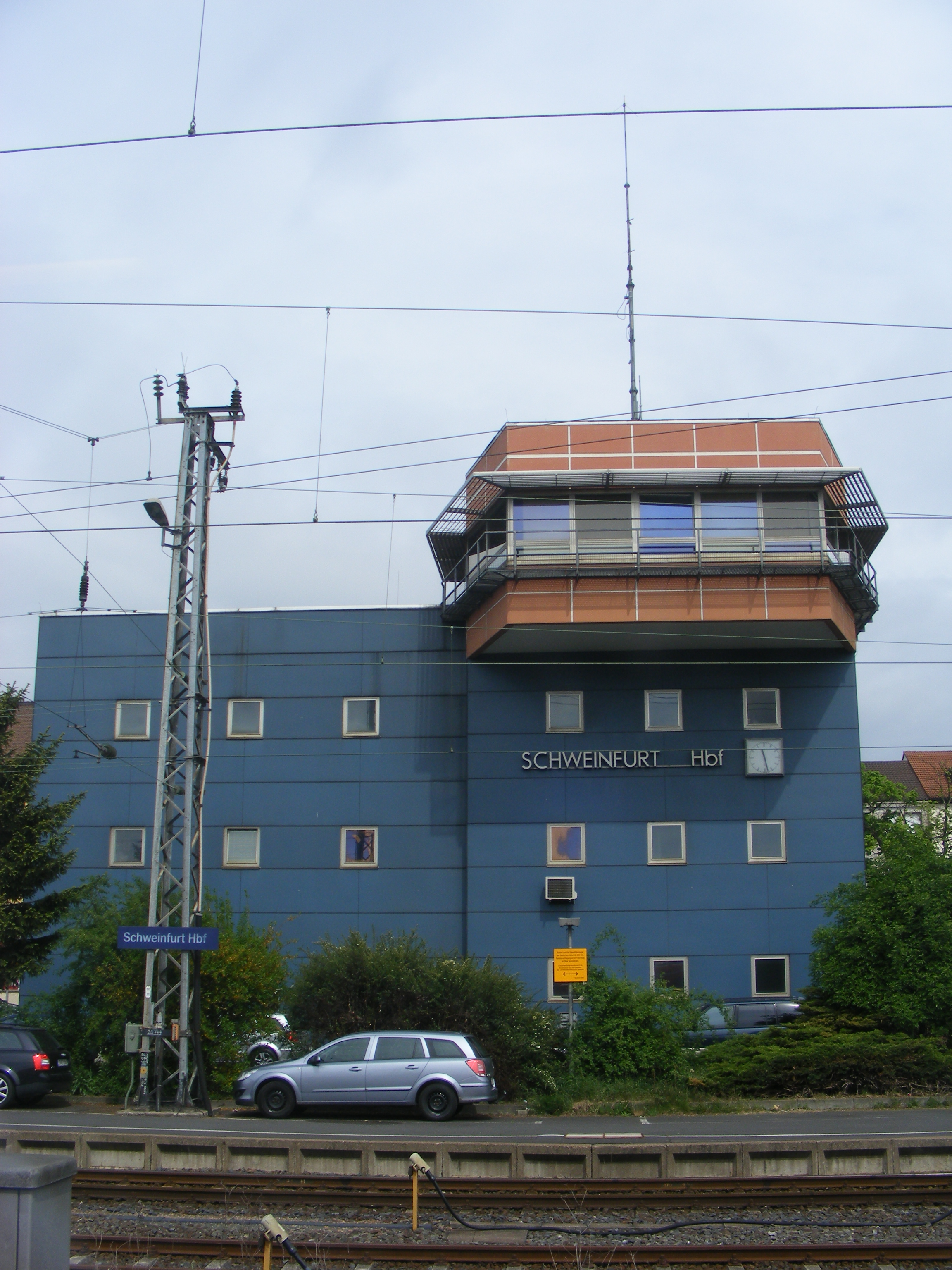 Schweinfurt - Hauptbahnhof, DB-Stellwerkgebäude vom Zug gesehen.